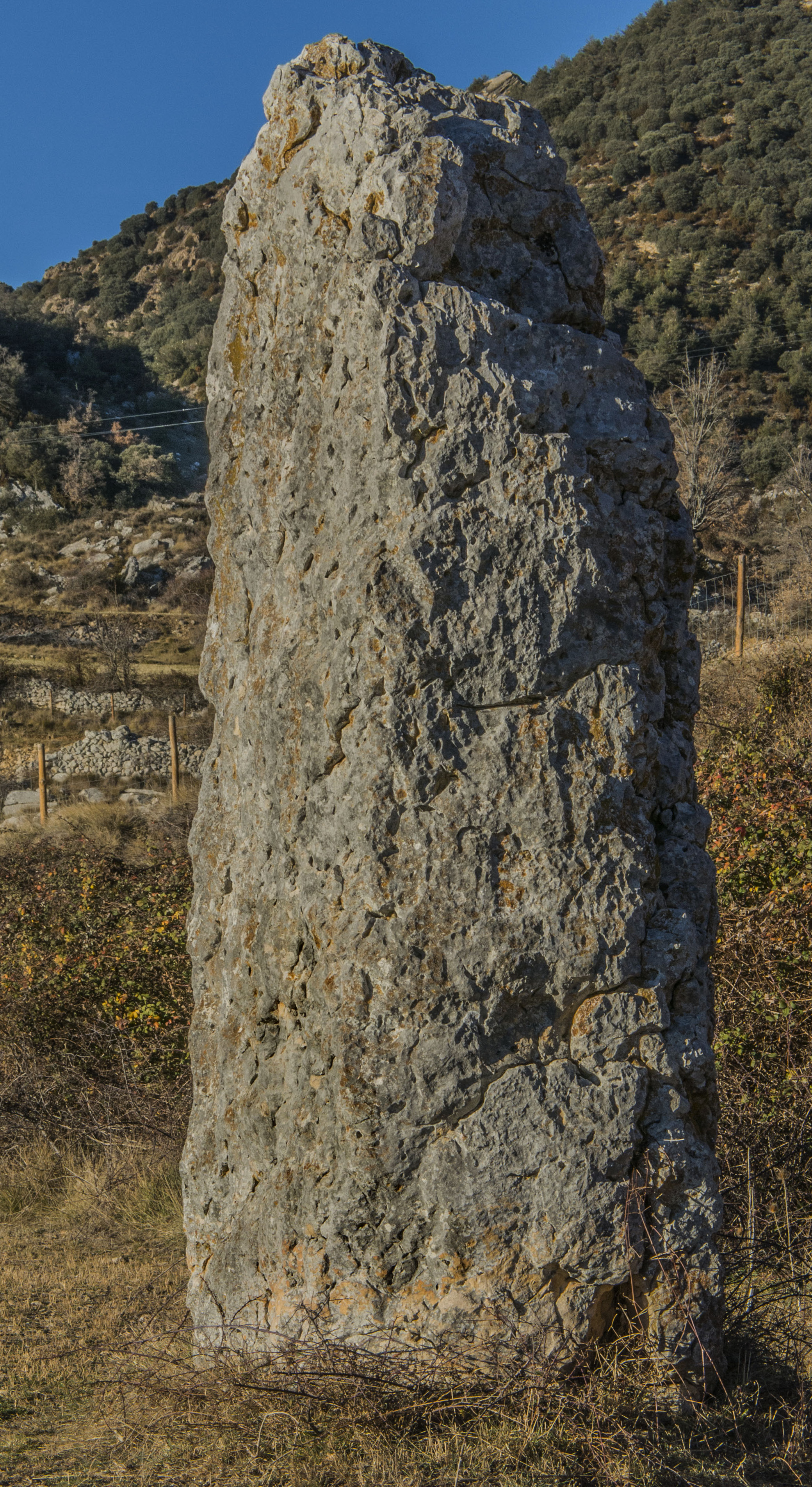 Menhir situat a Merli, al terme d'Isàvena, a la Ribagorça aragonesa.